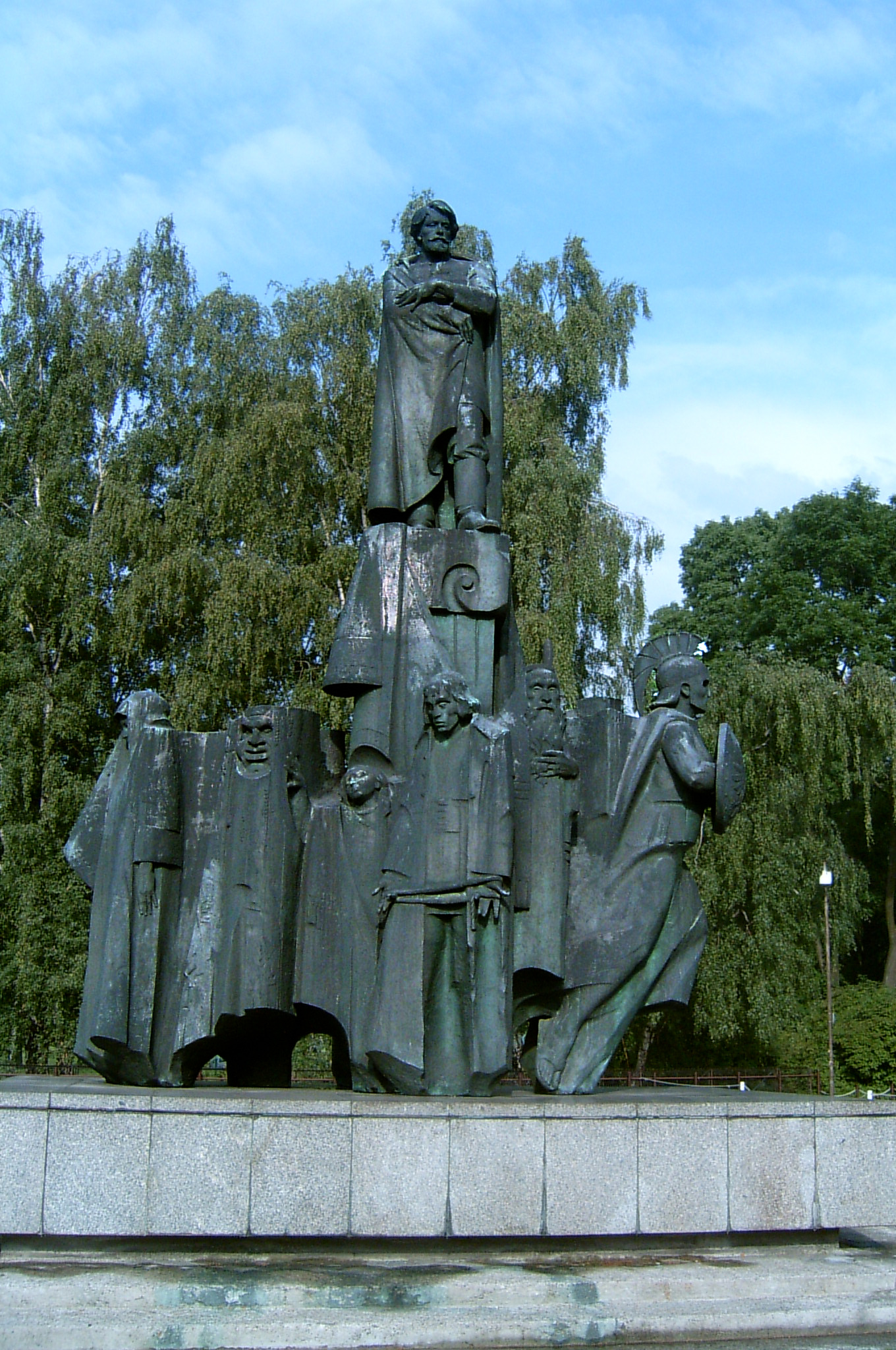 Kraków, Poland